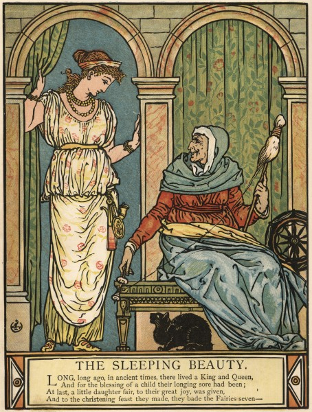 Гравюры по рисункам Крейна к сказкам «Синяя Борода», «Спящая Красавица», «Красная Шапочка», «Джек и бобовый стебель»